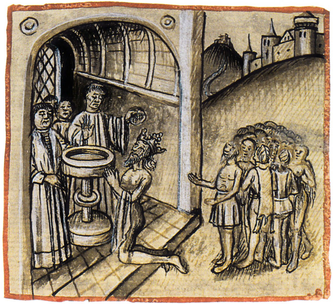 Abbildung zu Beginn des 80. Kapitels des Le Canarien Version B